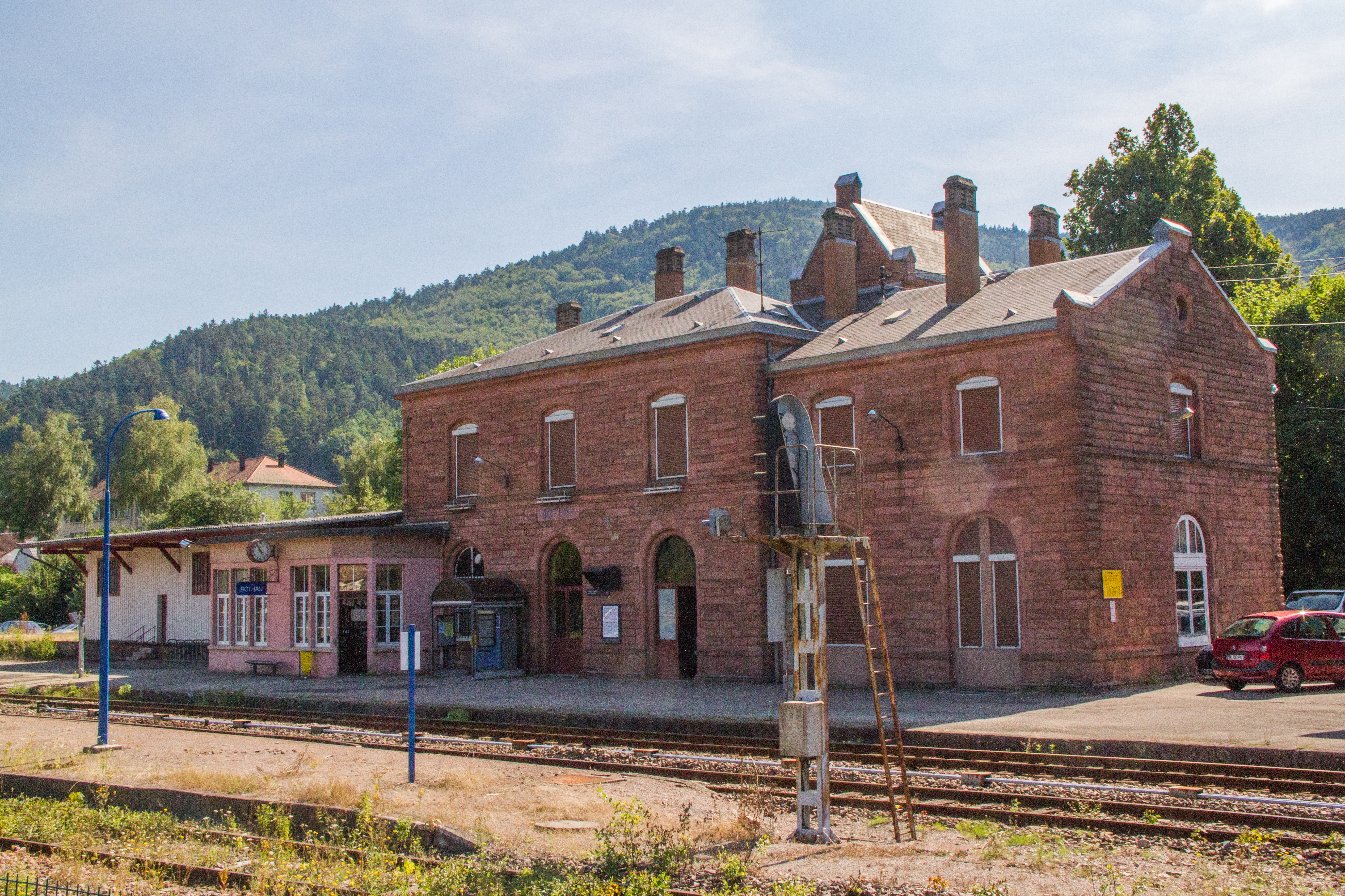 Gare SNCF de Rothau, 15 août 2013